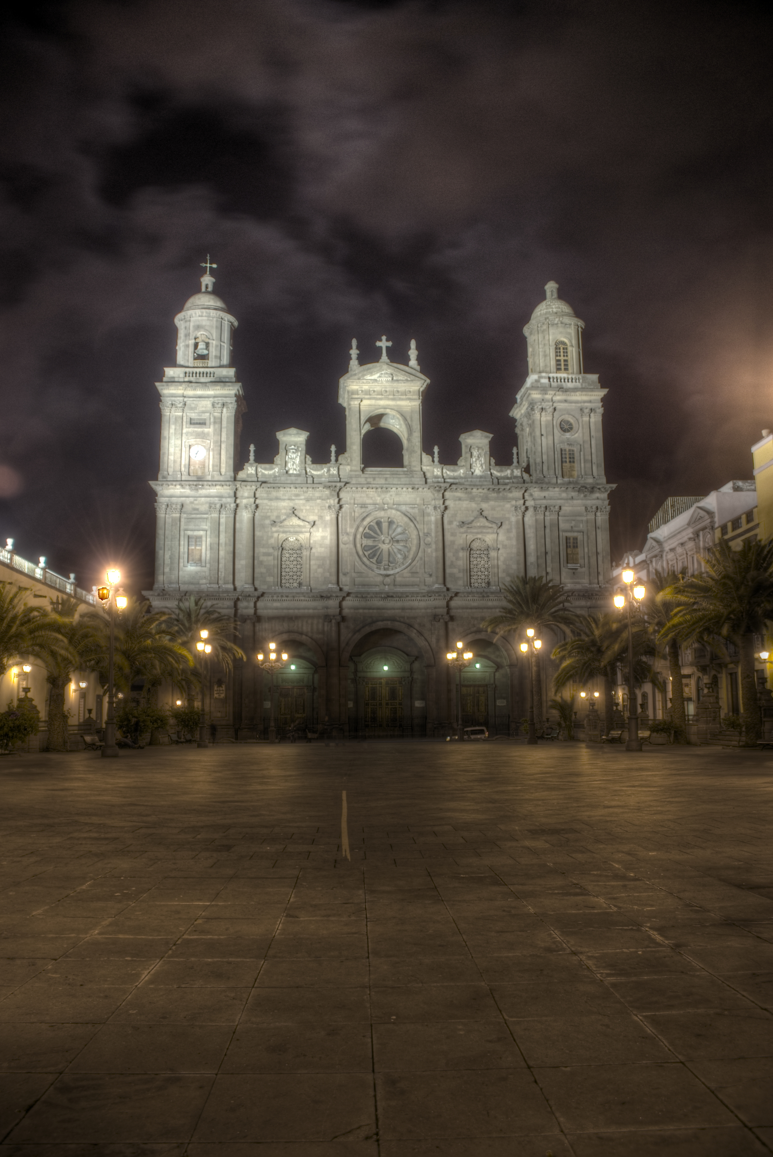 Foto de la Catedral de Santa Ana en Las Palmas de Gran Canaria, España.